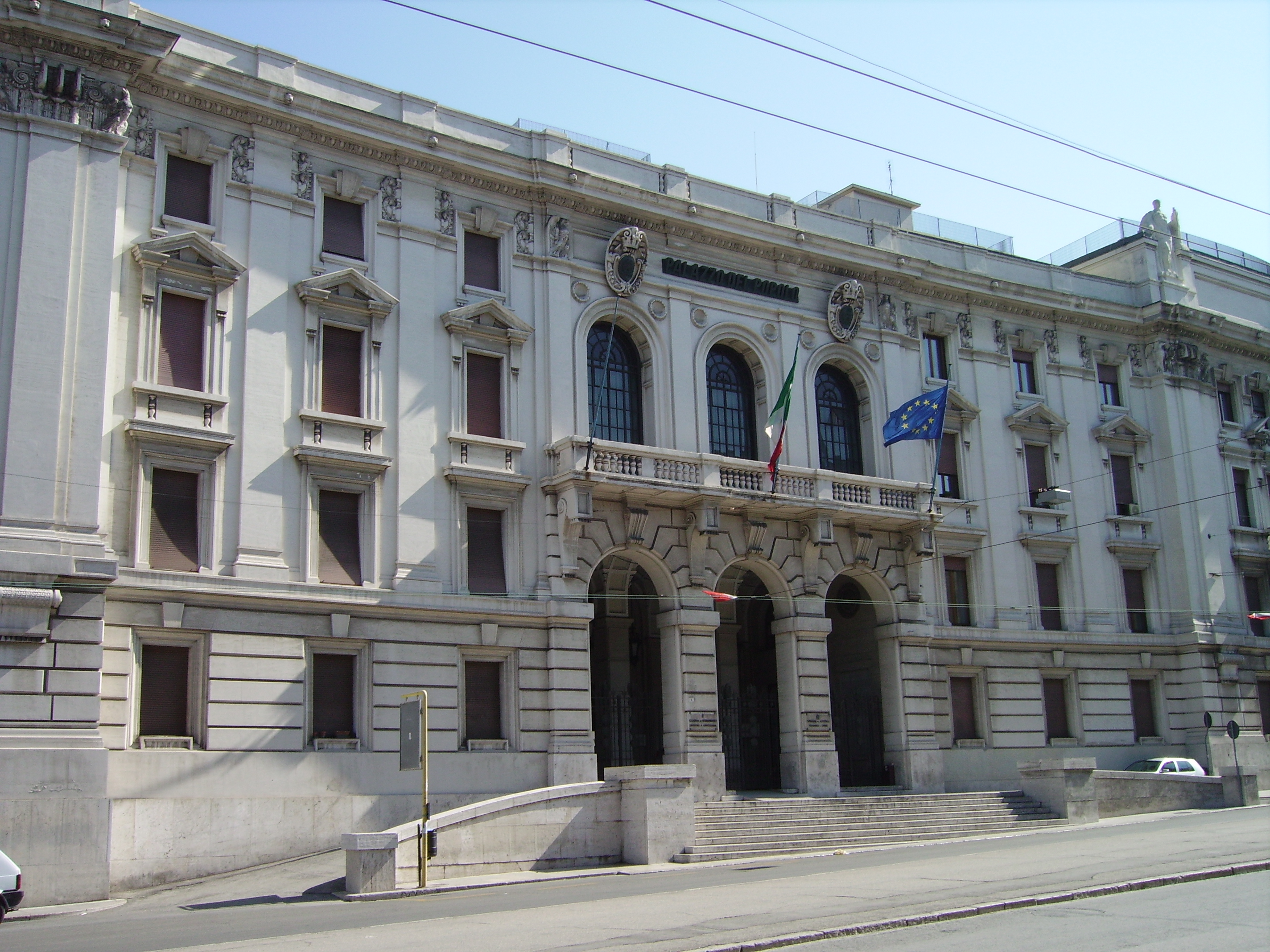 Palazzo del Popolo o del Littorio, dal 1945 al 2011 sede del comune di Ancona.